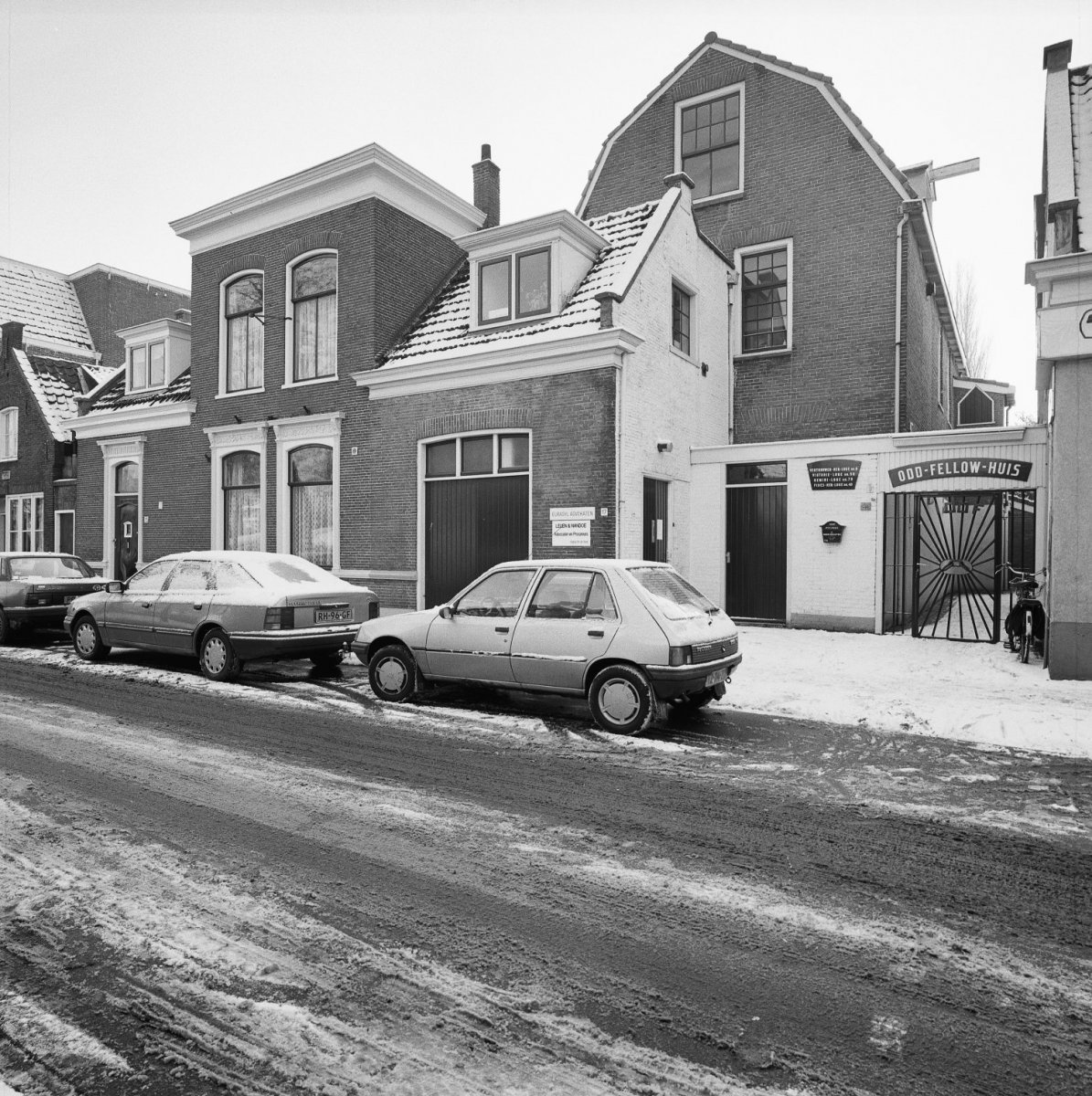 Gemeentelijk monument Varnebroek 15-17 Alkmaar. Exterieur overzicht voorgevel. Dit pand is in 1875 gebouwd als rentenierswoning en bestond uit een lang gerekte woning met één bouwlaag onder een zadeldak met een kapverdieping en met links de voordeur en rechts een koetshuis. Het in neoclassicistische bouwtrant gebouwde woonhuis bezat oorspronkelijk als tuitgevel uitgevoerde zijgevels en in het front was mogelijk een lijstdoorsnijdende dakkapel gesitueerd. In 1883 is het pand ontsplitst en is het koetshuis een zelfstandig pand geworden waarvan de afgeronde schampstenen aan weerszijde van de poort nog aanwezig zijn. In dat jaar is het huidige Varnebroek 15 met een rechthoekig deel (boet) aan de rechterzijde uitgebouwd de lange smalle tuin in. In 1904 wordt dit pand gekocht door J. Ringers die in 1904 samen met H. Ringers een stukje grond aankocht achter het voormalige koetshuis. Dit wordt bebouwd ten gunste van de hier op 3 april 1905 in gebruik genomen chocoladefabriek van de Fa. Ringers. J. Ringers die het huis van de gemeente Alkmaar aankocht heeft waarschijnlijk het pand rechts boven de parterre ramen van een extra verdieping in dezelfde stijl voorzien.